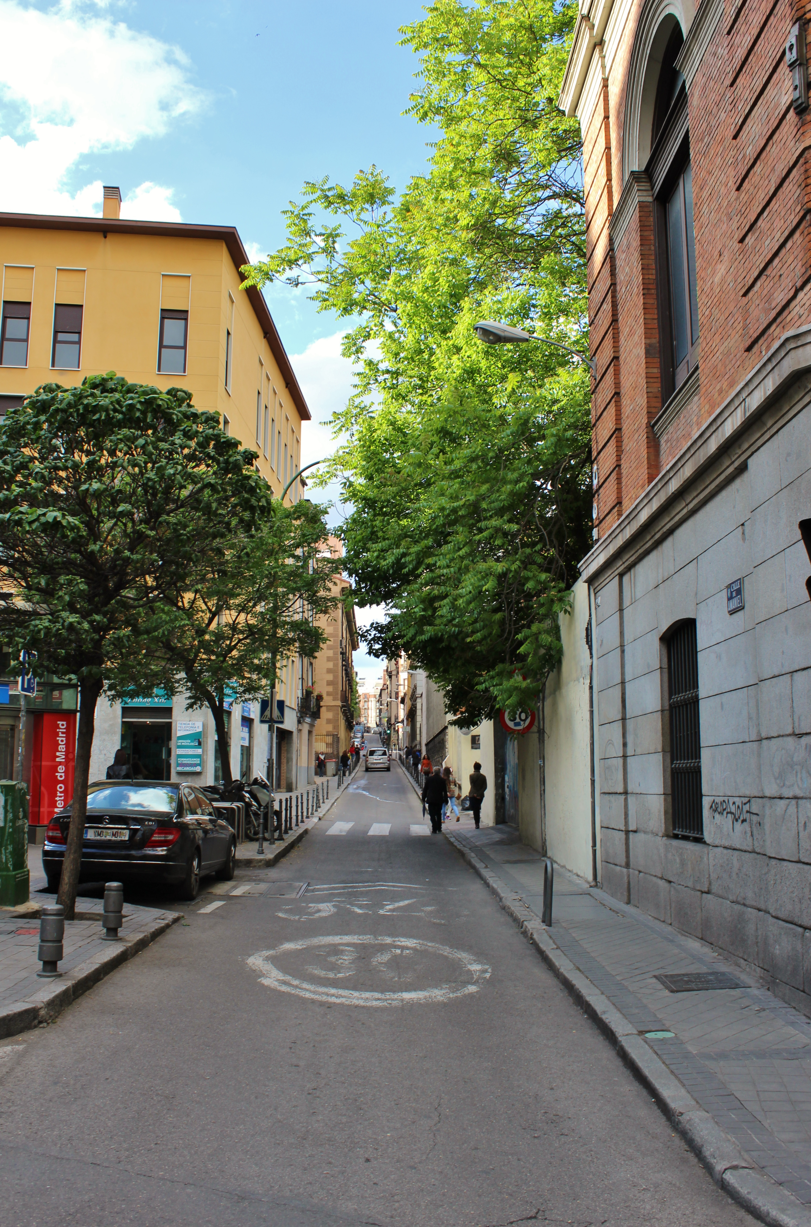 Calle de Amaniel, Madrid. This is a retouched picture, which means that it has been digitally altered from its original version. Modifications: Distorted car plates.